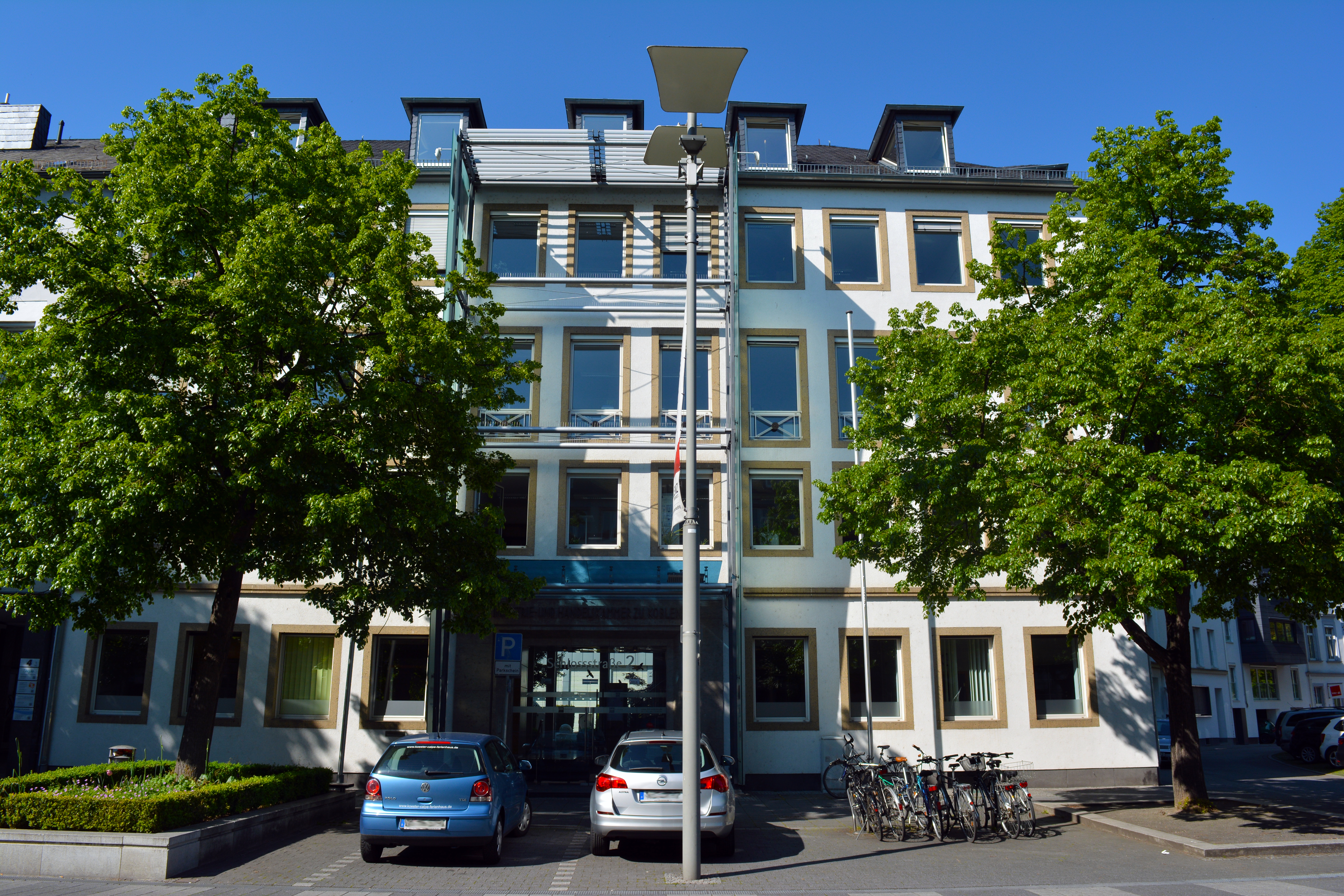 Zentrale der IHK Koblenz in der Schloßstraße, Koblenz